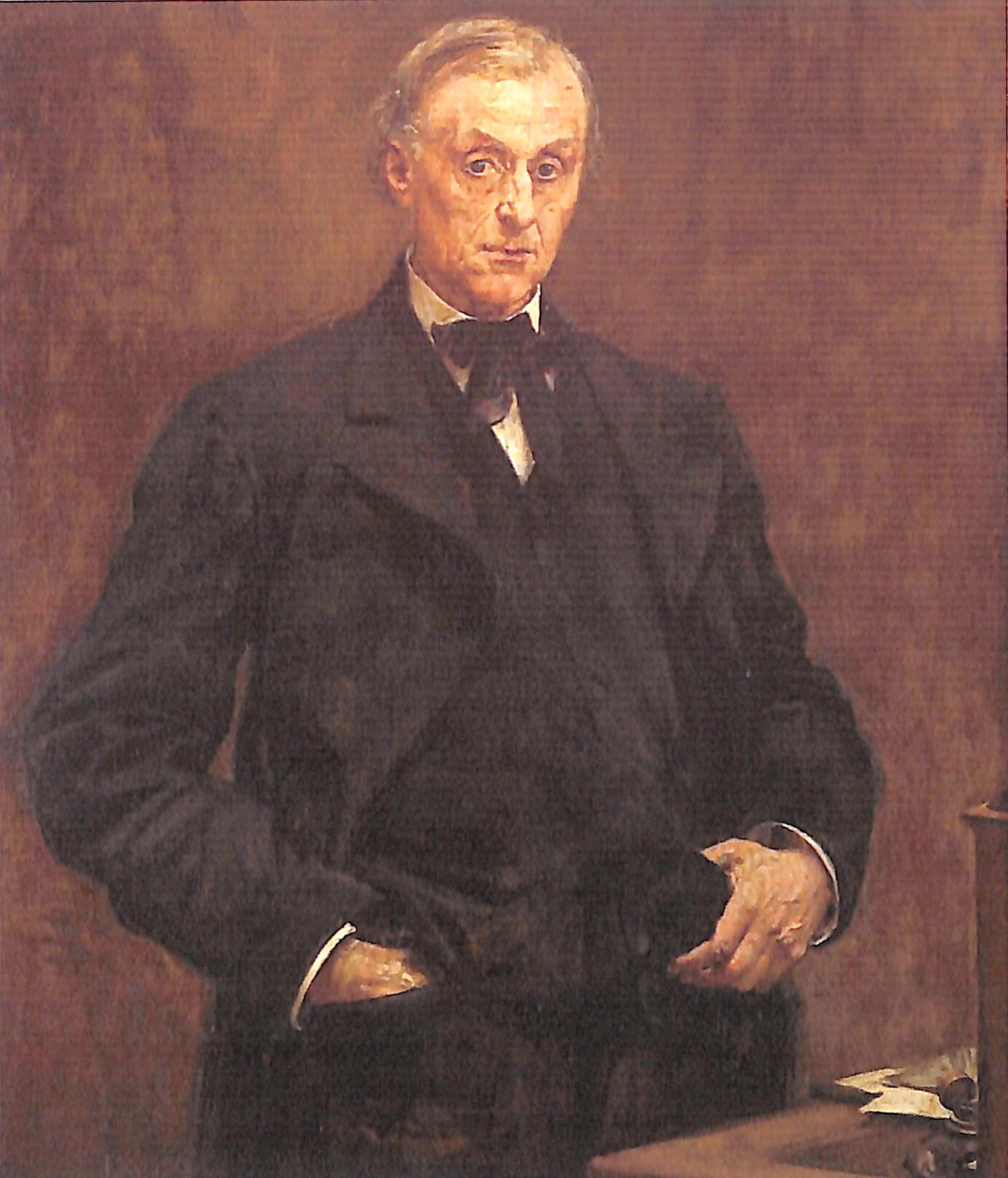 Peinture d'Alphonse Peyrat par Paul Baudry